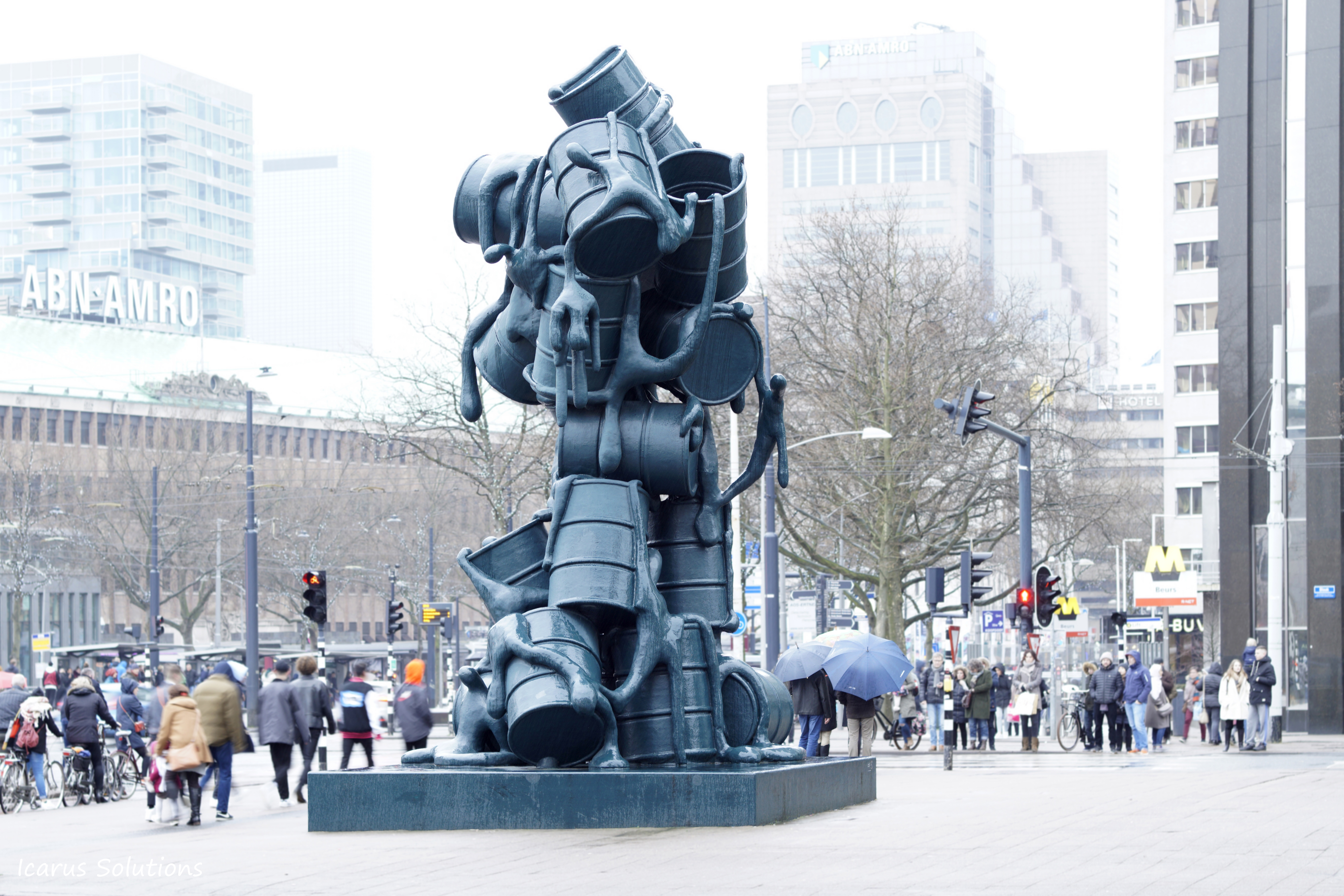 Cascade, een modern kunstwerk van de beeldhouwer Joep van Lieshout. Op het kruispunt Coolsingel/Blaak/Schiedamse dijk/West Blaak.